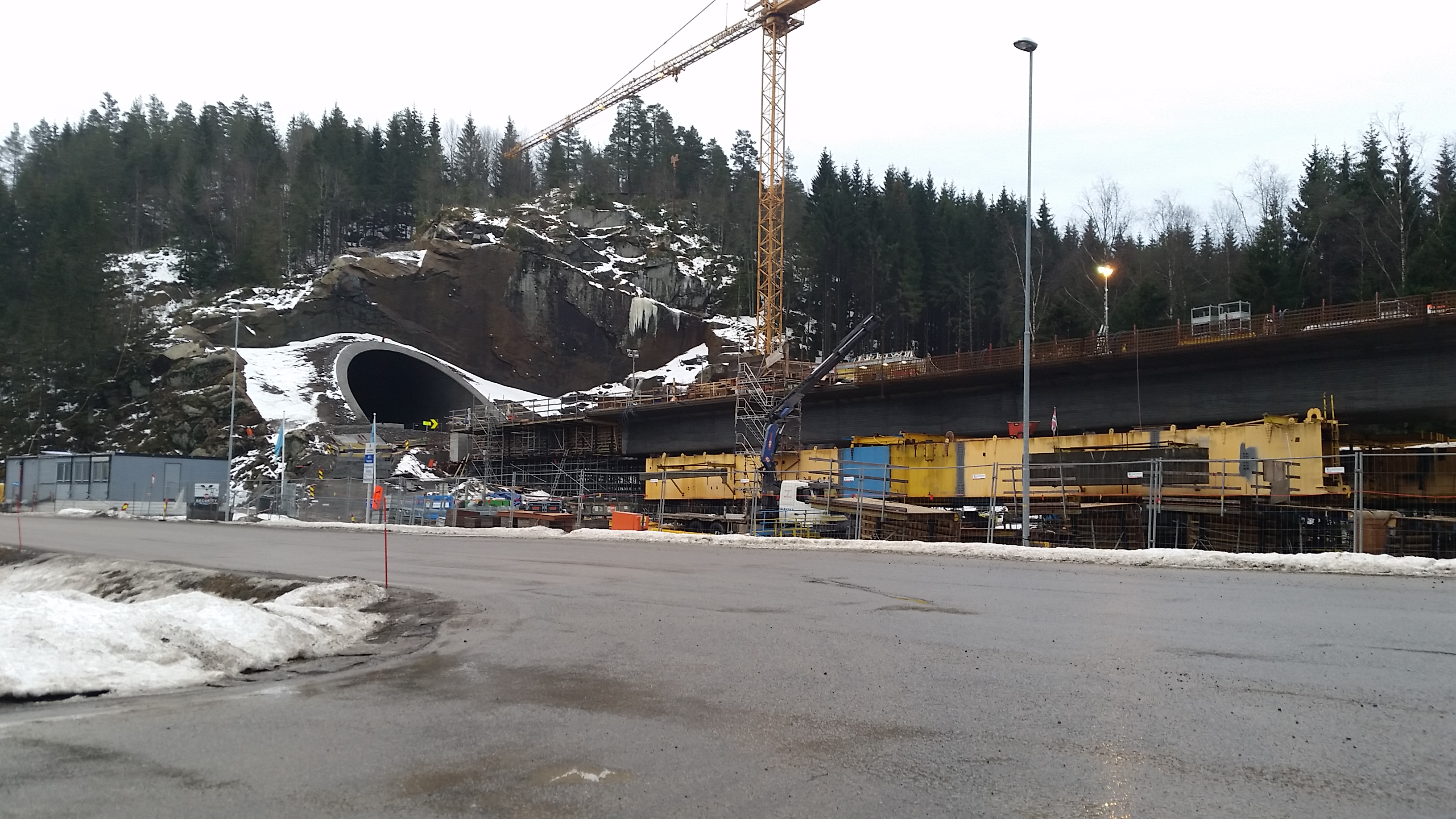 Paulertjønnbrua og Kleivertunnelens vestre åpning